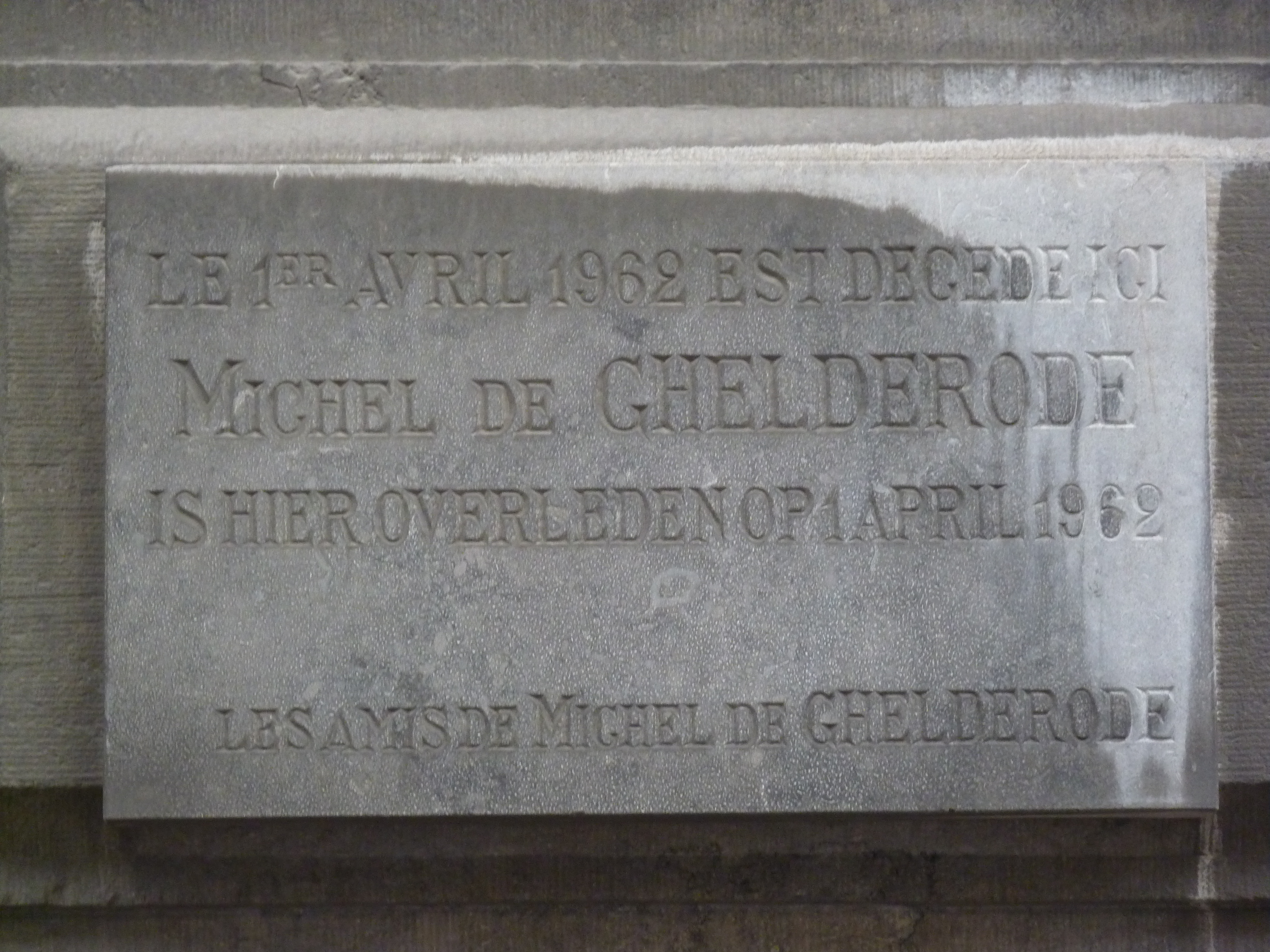 Michel de Ghelderode au n°71 de la rue Lefrancq à Schaerbeek, Bruxelles.